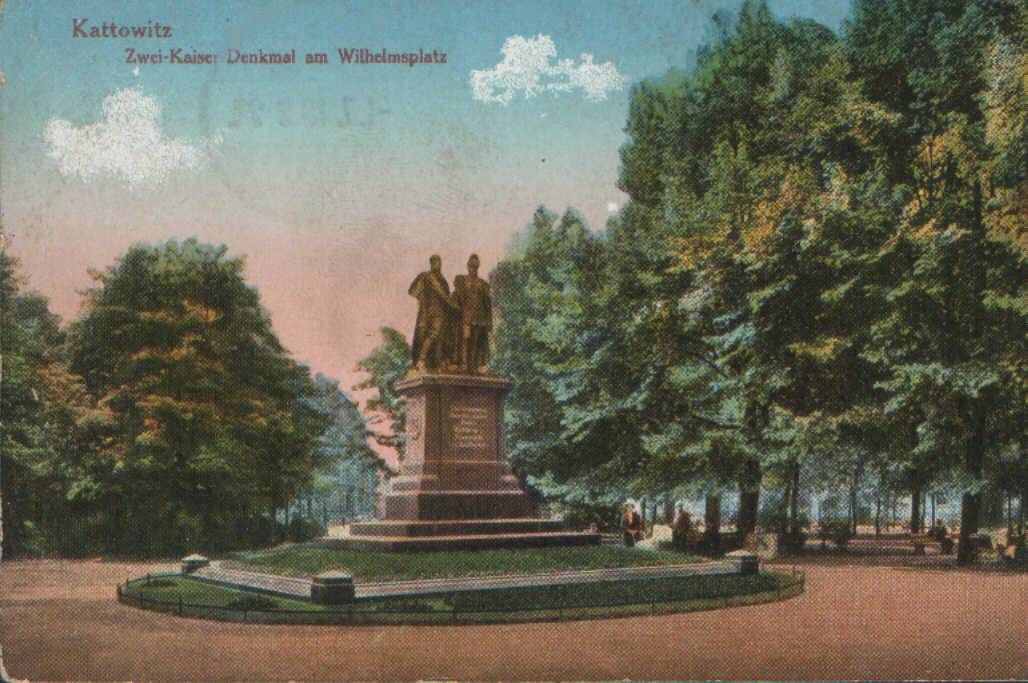 Stara pocztówka Katowic przedstawiająca plac Wolności z pomnikiem dwóch cesarzy.